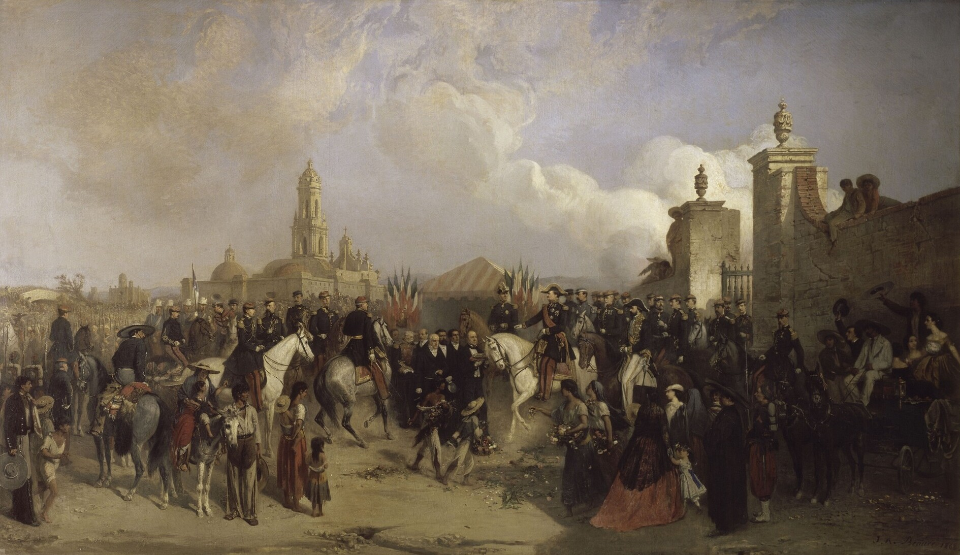 Entrée du corps expéditionnaire français à Mexico, 10 juin 1863. Intervention française au Mexique (1861-1867).